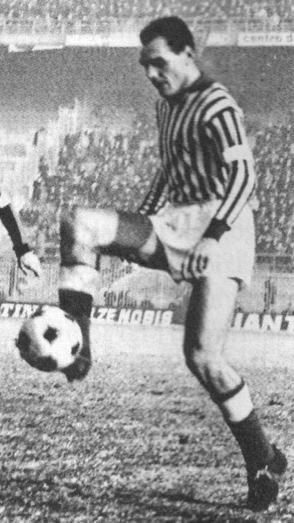 Milano, stadio San Siro. Il calciatore brasiliano Luís Vinício, capitano del L.R. Vicenza, in azione durante una trasferta sul campo dell'Inter, negli anni 60 del XX secolo.